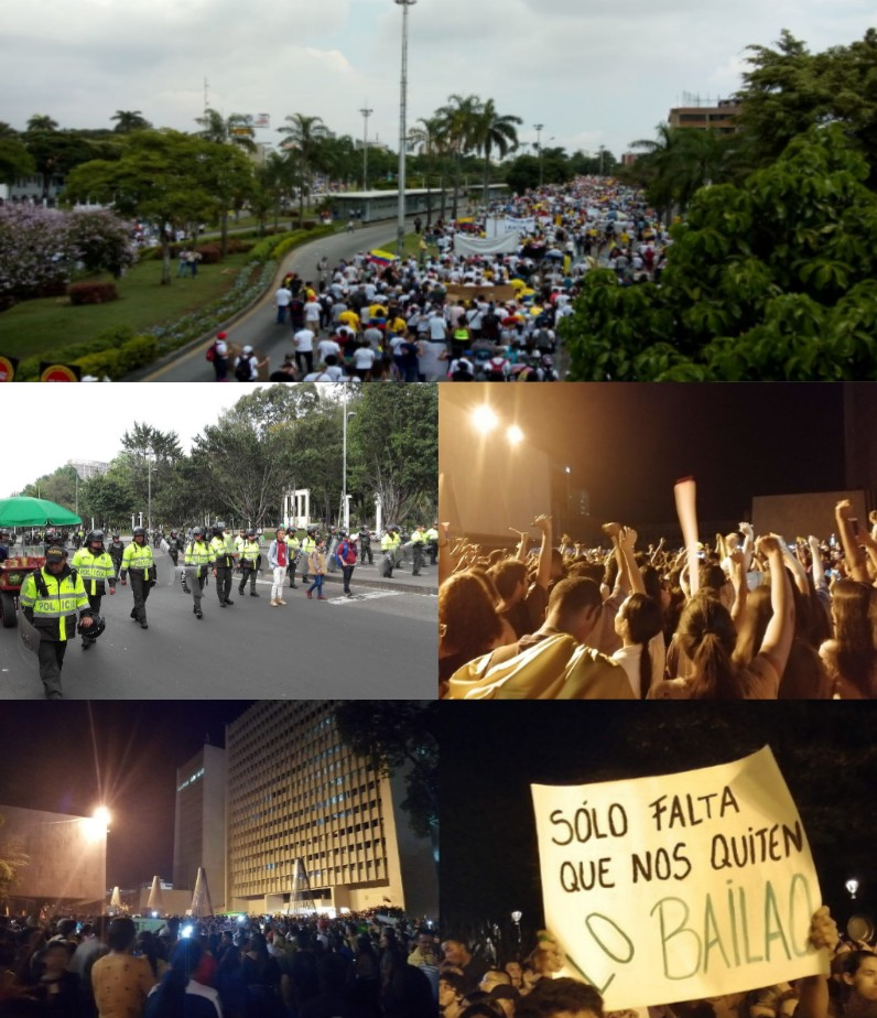 Protestas en Colombia de 2019-2020